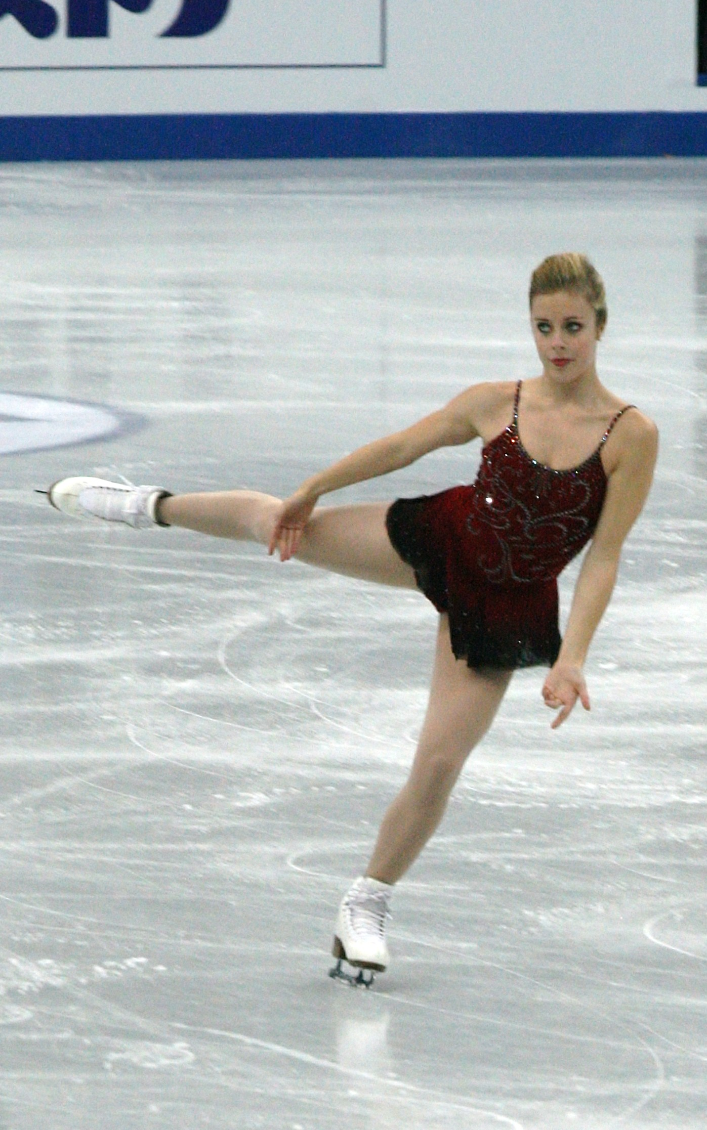 Эшли Вагнер (США) на финале Гран-при 2012-2013. Короткая программа.